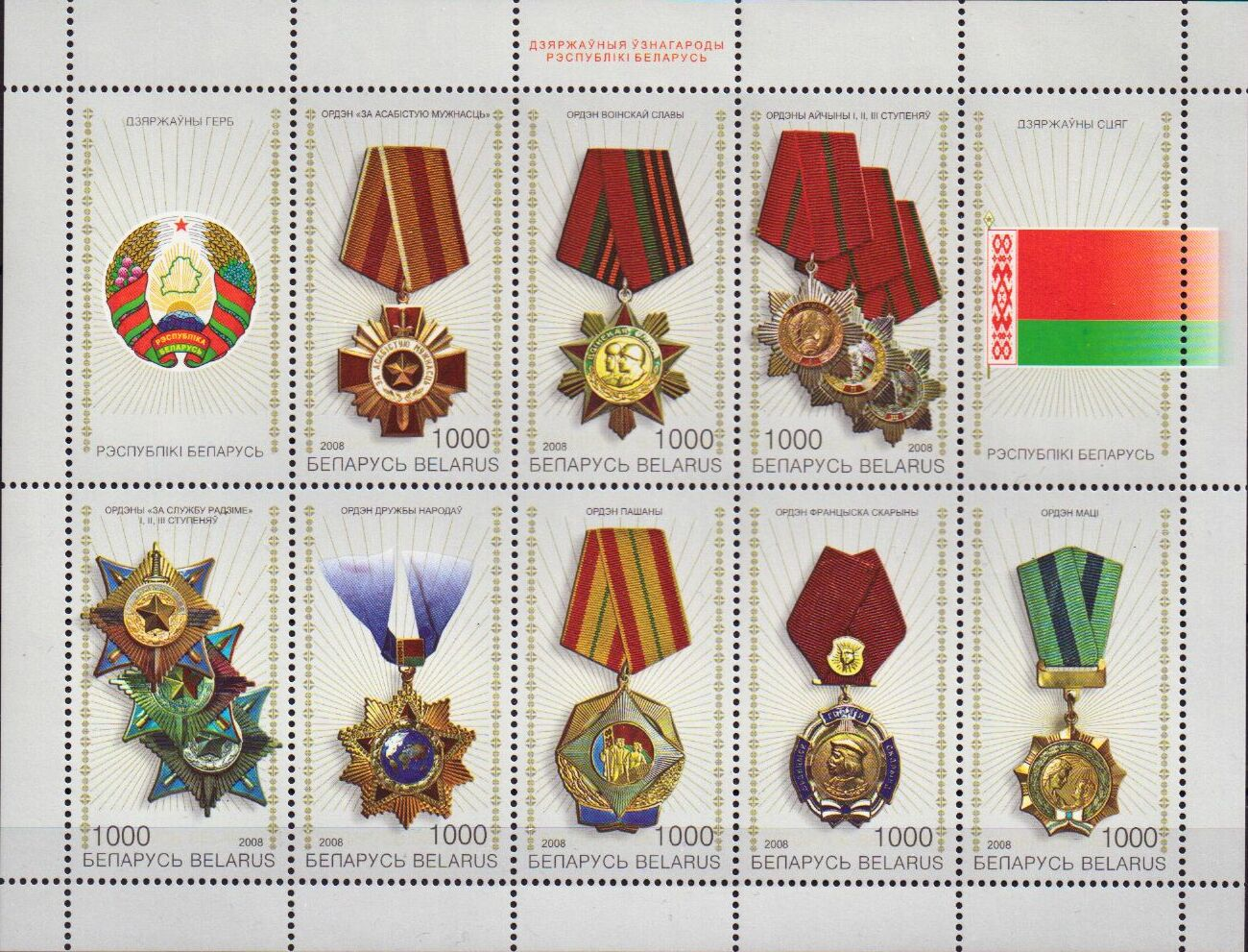 Марки с орденами Белоруссии